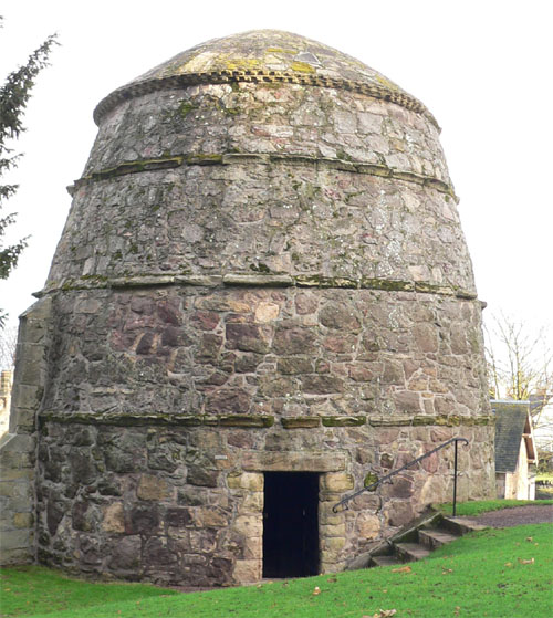 Dirleton Castle (Scotland) - dovecot